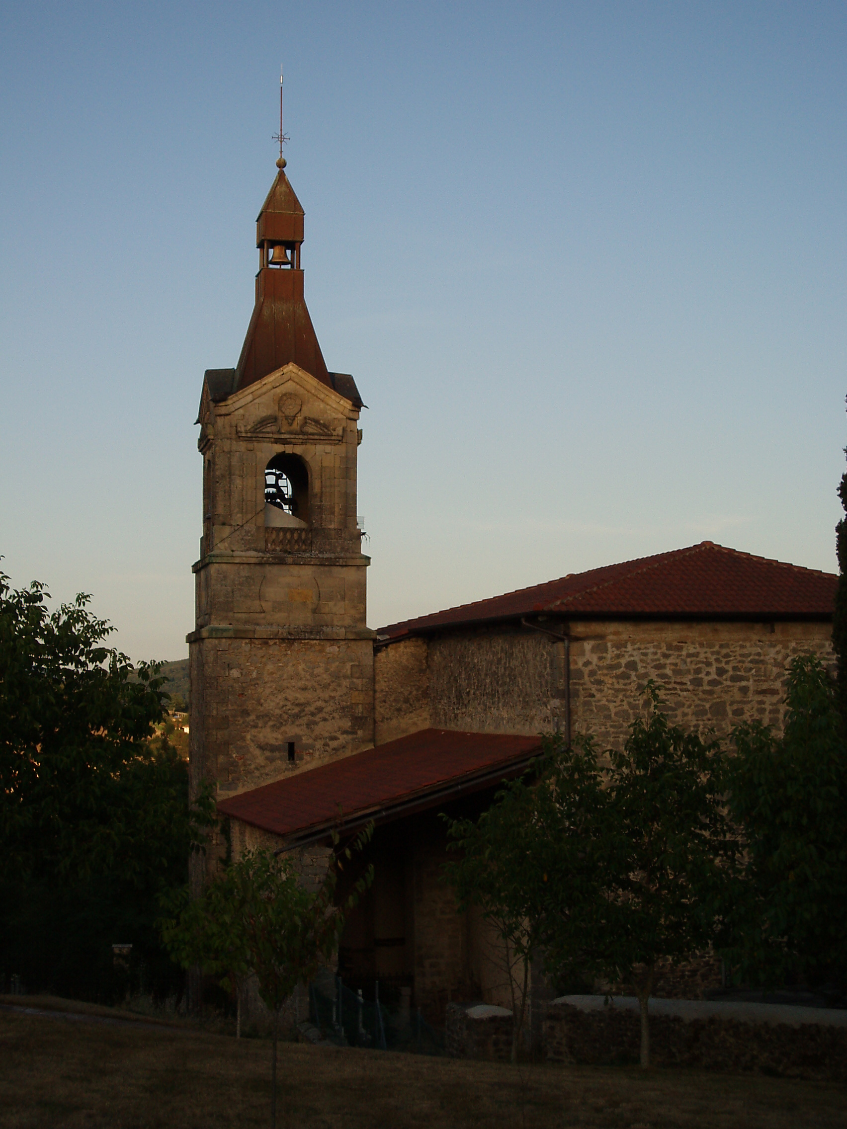 Vista de la Iglesia de la Natividad de Nuestra Señora de Izarra Urkabustaiz Alava